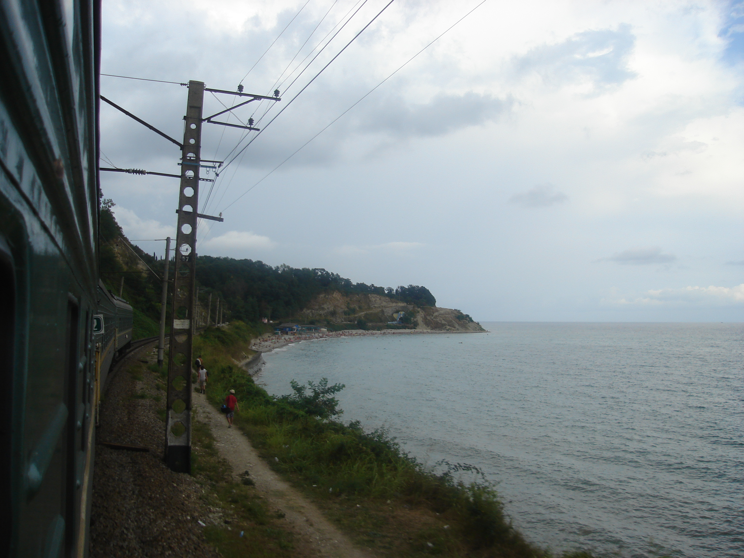 Поезд "Адлер-Казань"; железная дорога вдоль Чёрного моря, Большие Сочи.